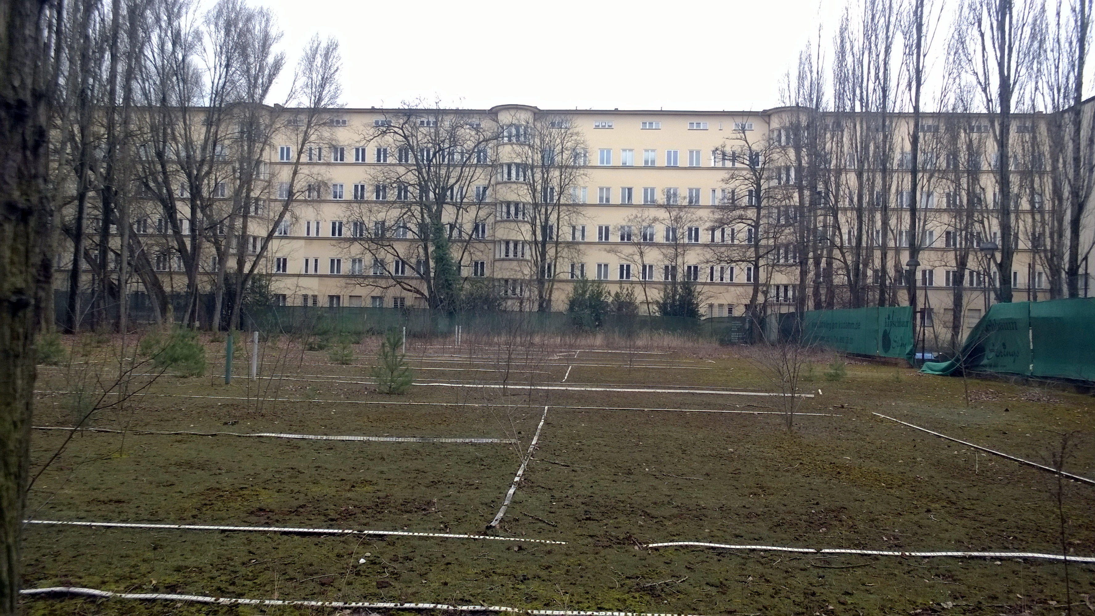 Berlin-Wilmersdorf WOGA-Komplex Tennisplätze